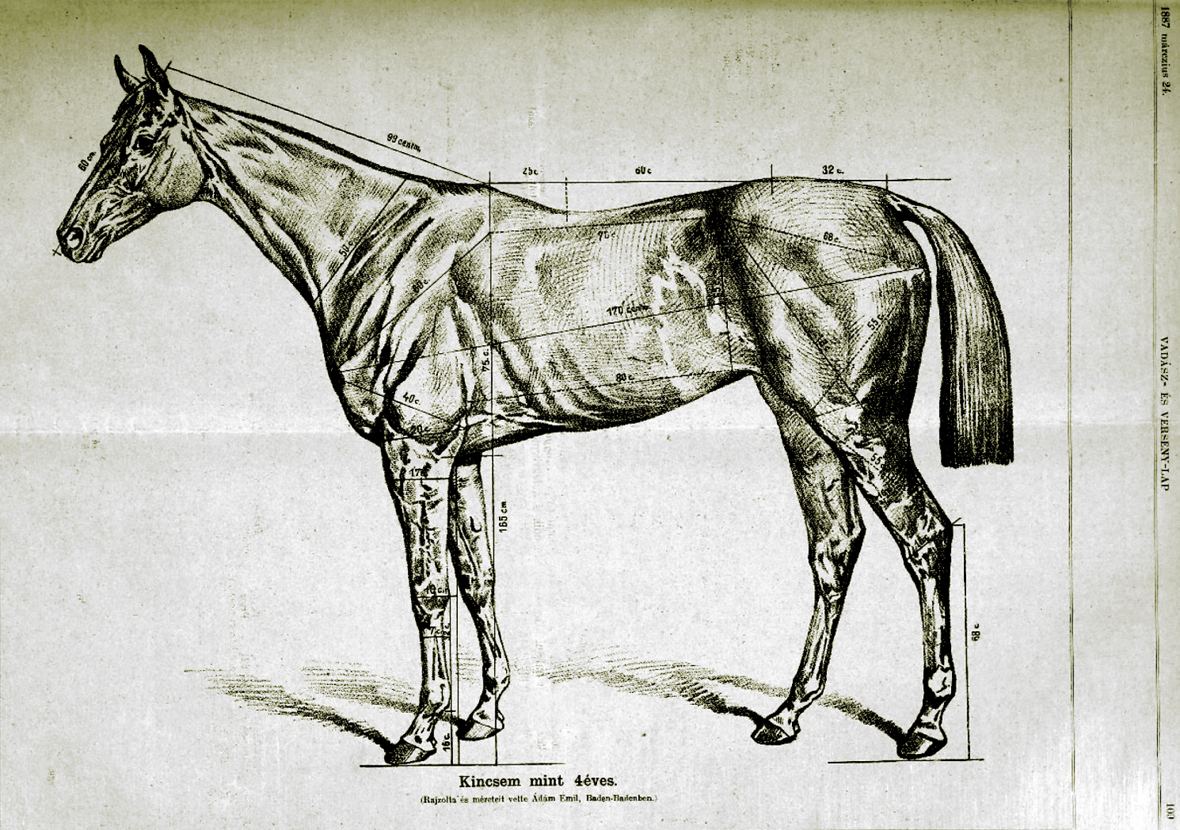 Kincsem mint 4 éves. Vadász- és Versenylap 1857-1919 Vadász- és Versenylap 31. évfolyam, 18871887-03-24 / 12. szám 109. oldal